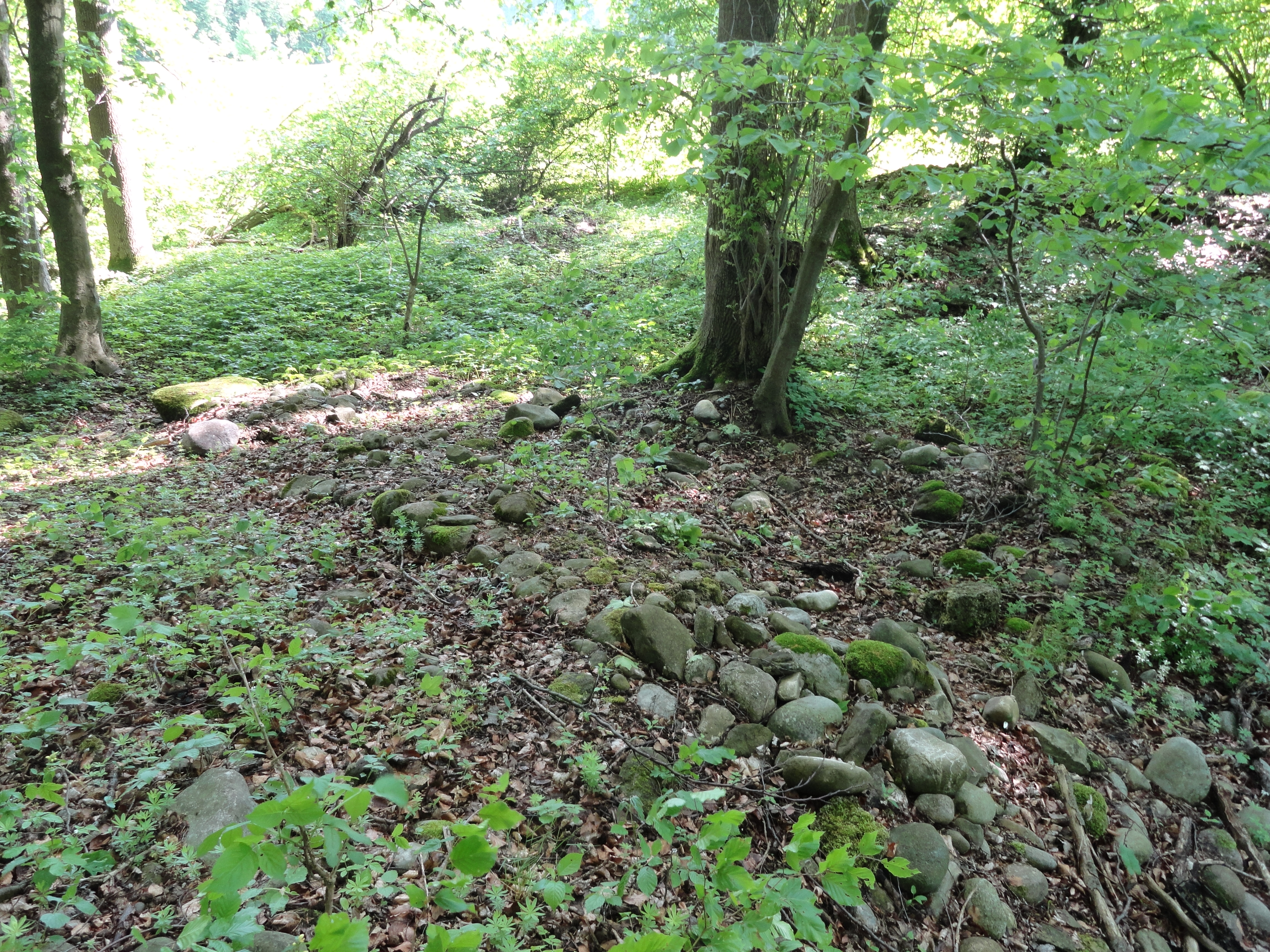 Areal der Burg Rossberg ; Rest eines Mauernzugs